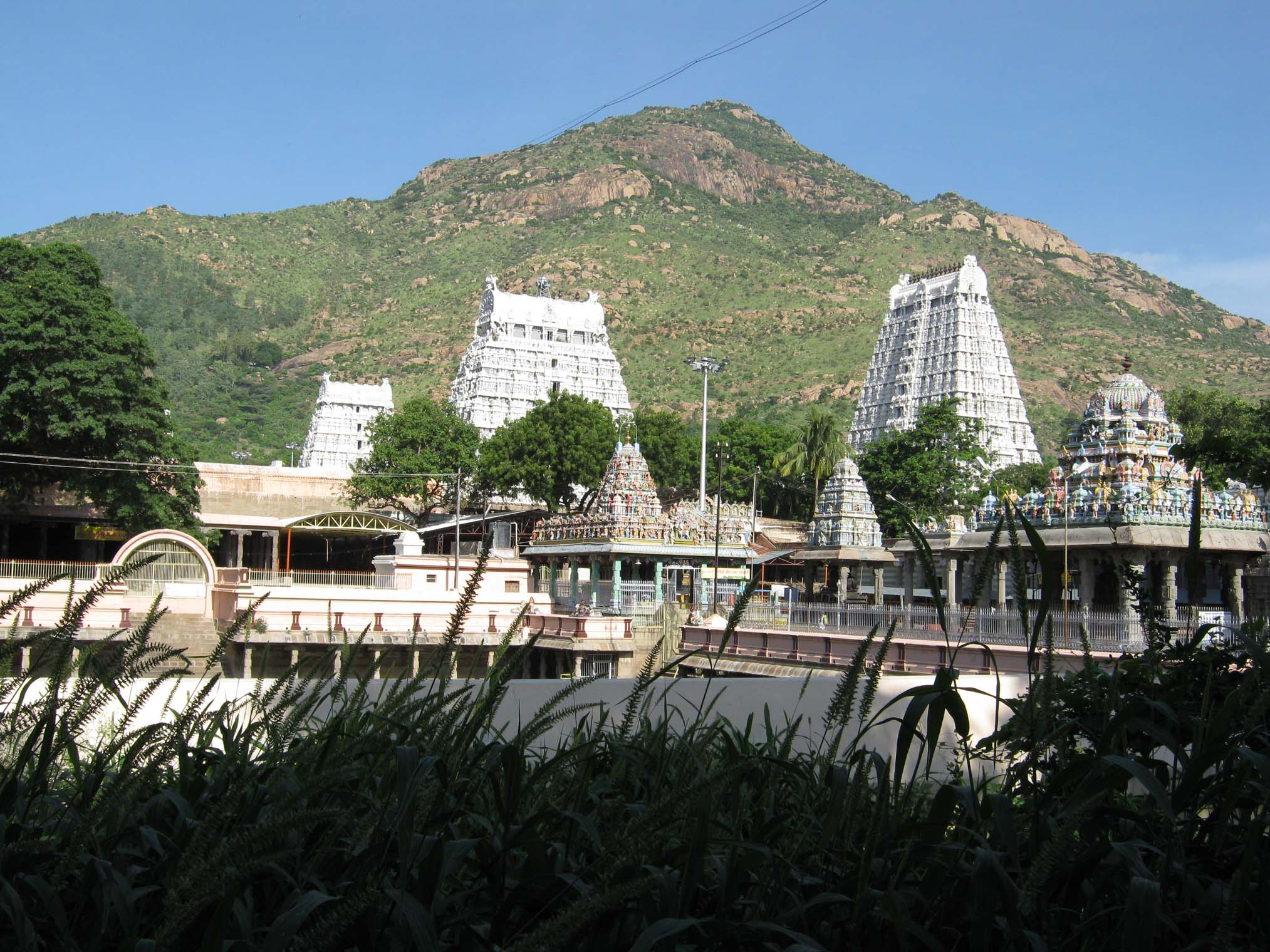 Tiruvannamali Temple